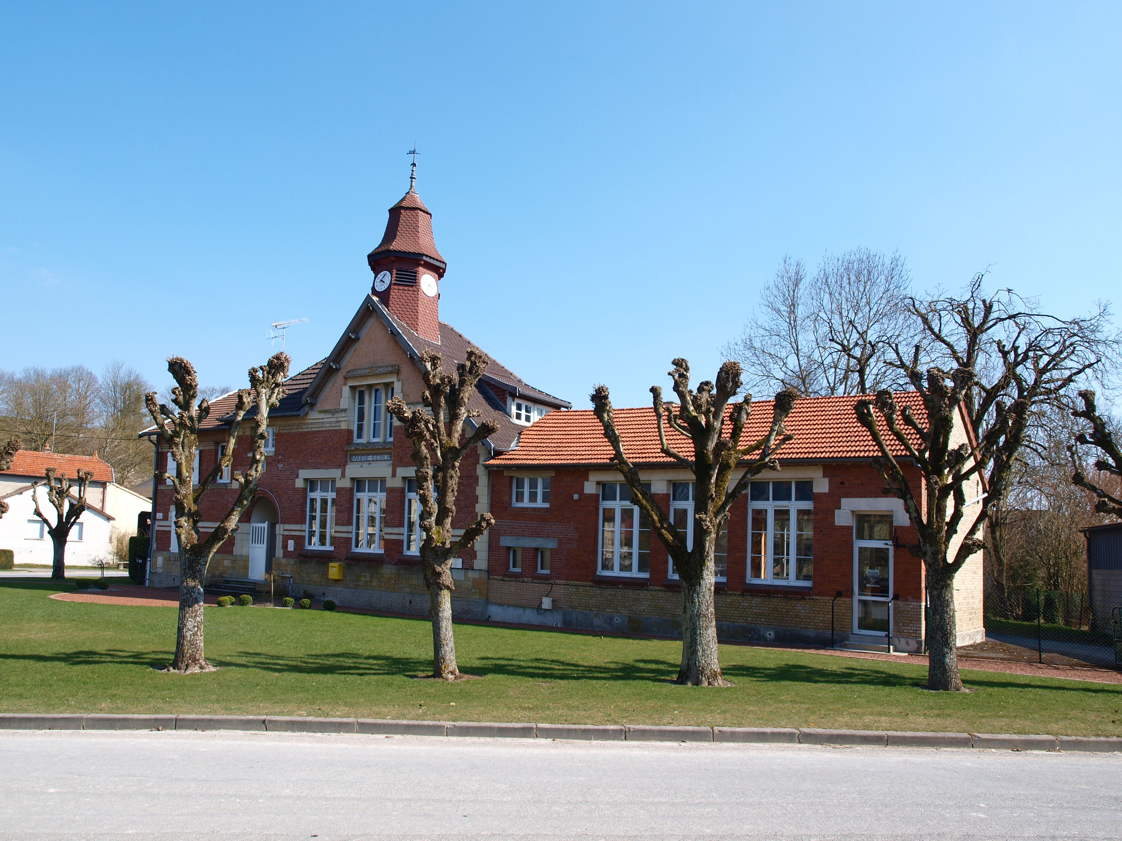 Semide (Ardennes, France) ; la mairie